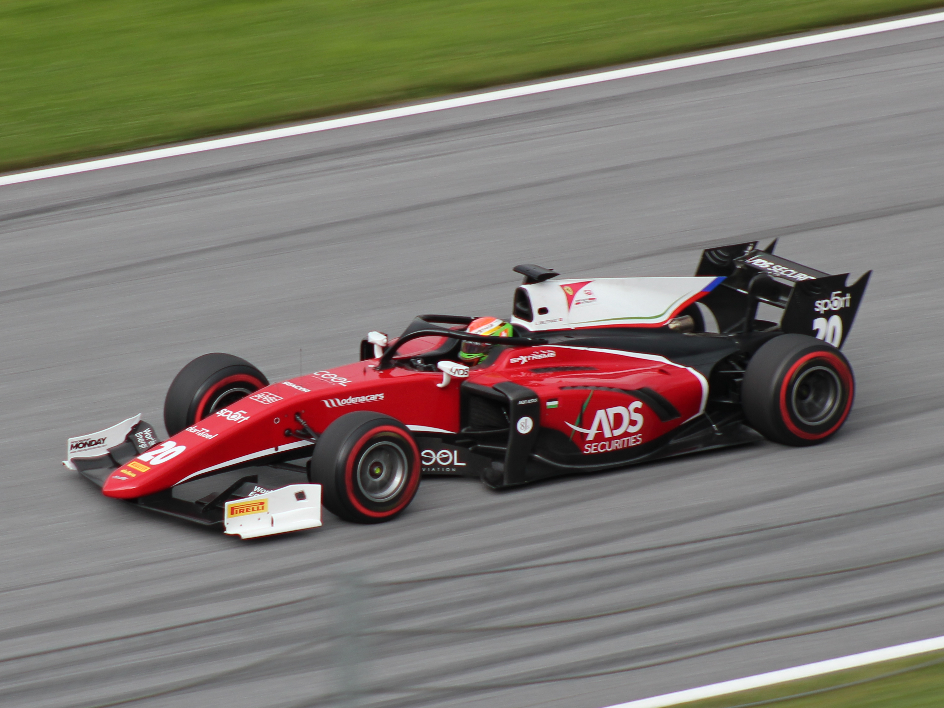 20 Louis Delétraz beim Rennwochenende in Österreich 2018